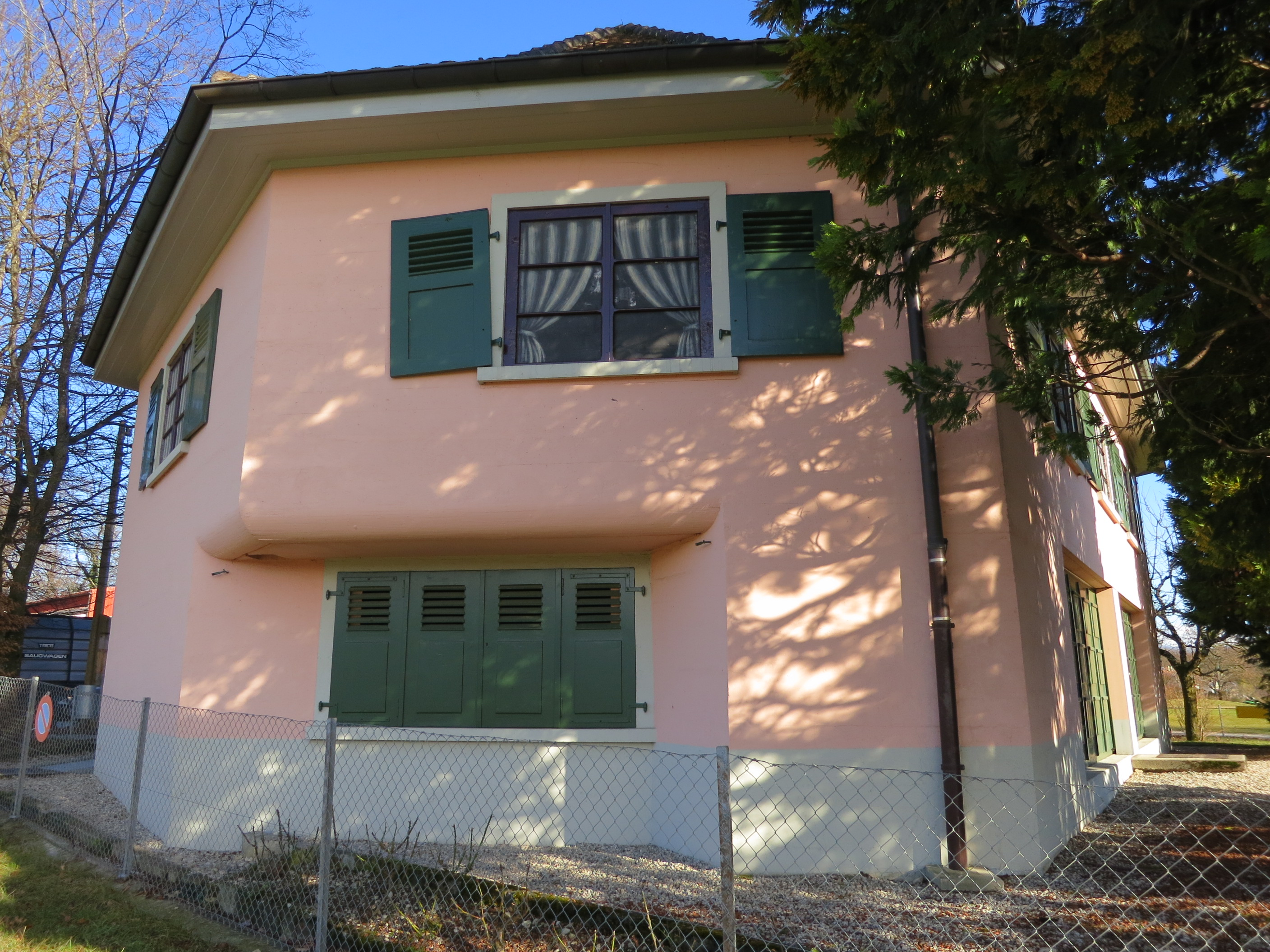 Villa Rose, Gland VD, Schweiz